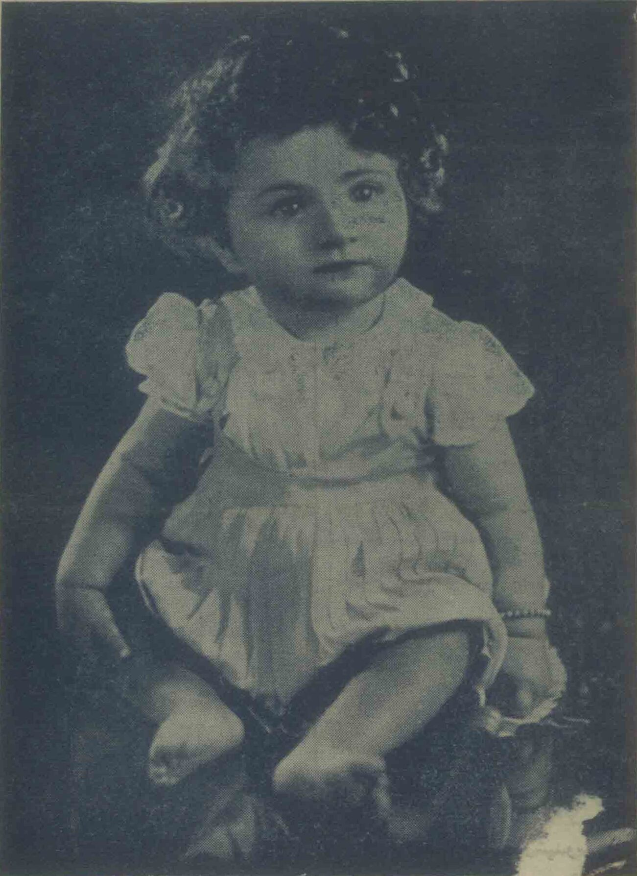 شهناز پهلوی